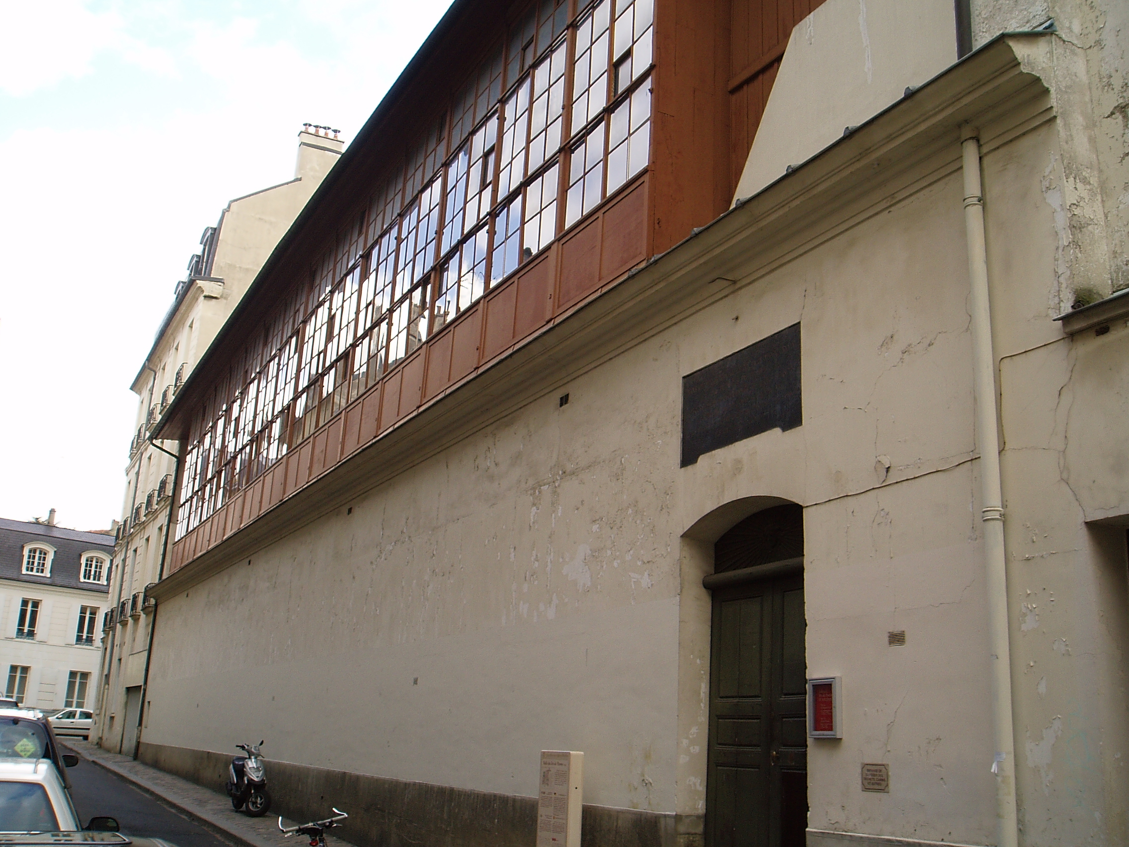 Salle du jeu de Paume, rue du jeu de Paume, Versailles Construction : 1686 Ancêtre du tennis, ce jeu, alors très en vogue, nécessita la construction d'une salle. C'est en ce lieu le 20 juin 1789, que les représentant du tiers états jurèrent de ne pas se séparer avant d'avoir donné une constitution à la France. The ancestor of tennis, this game, then very fashionable,required the building of a room.It is in this room, on the 20th june 1789 that the representatives of the third estate swore not to disband untill they had given France a constitution.